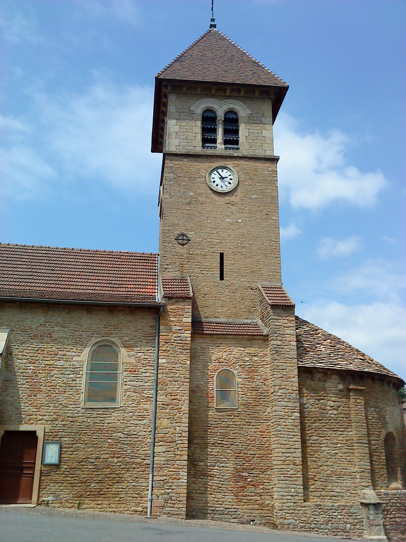 Eglise Saint-Pierre de Solutré-Pouilly (Saône-et-Loire, France)